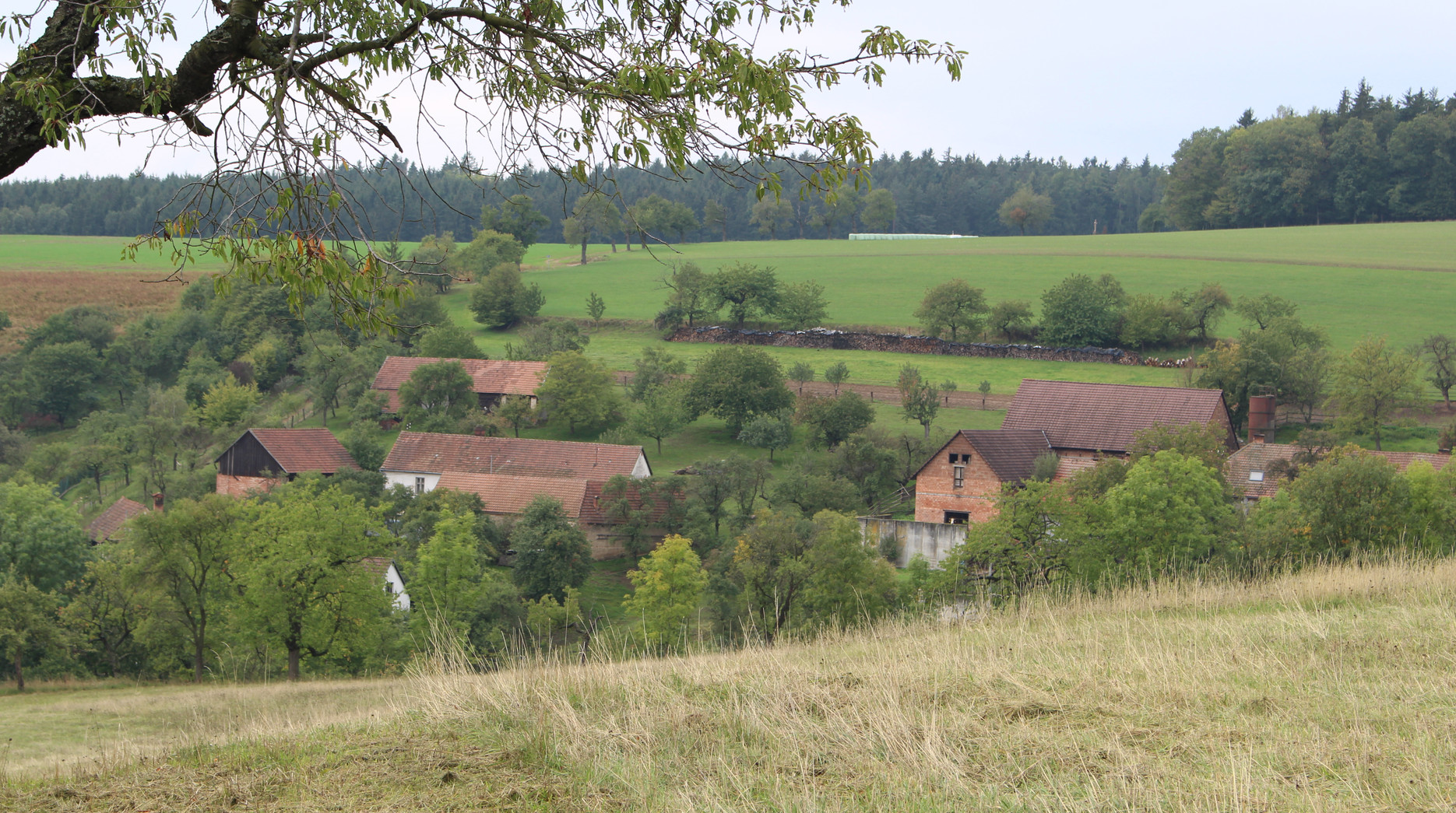 osada Nelepeč, část obce Nelepeč-Žernůvka, okres Brno-venkov, pohled od kříže severovýchodně od osady